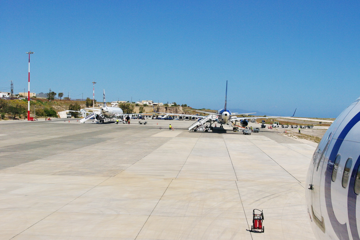 Vorfeld Flughafen Santorini